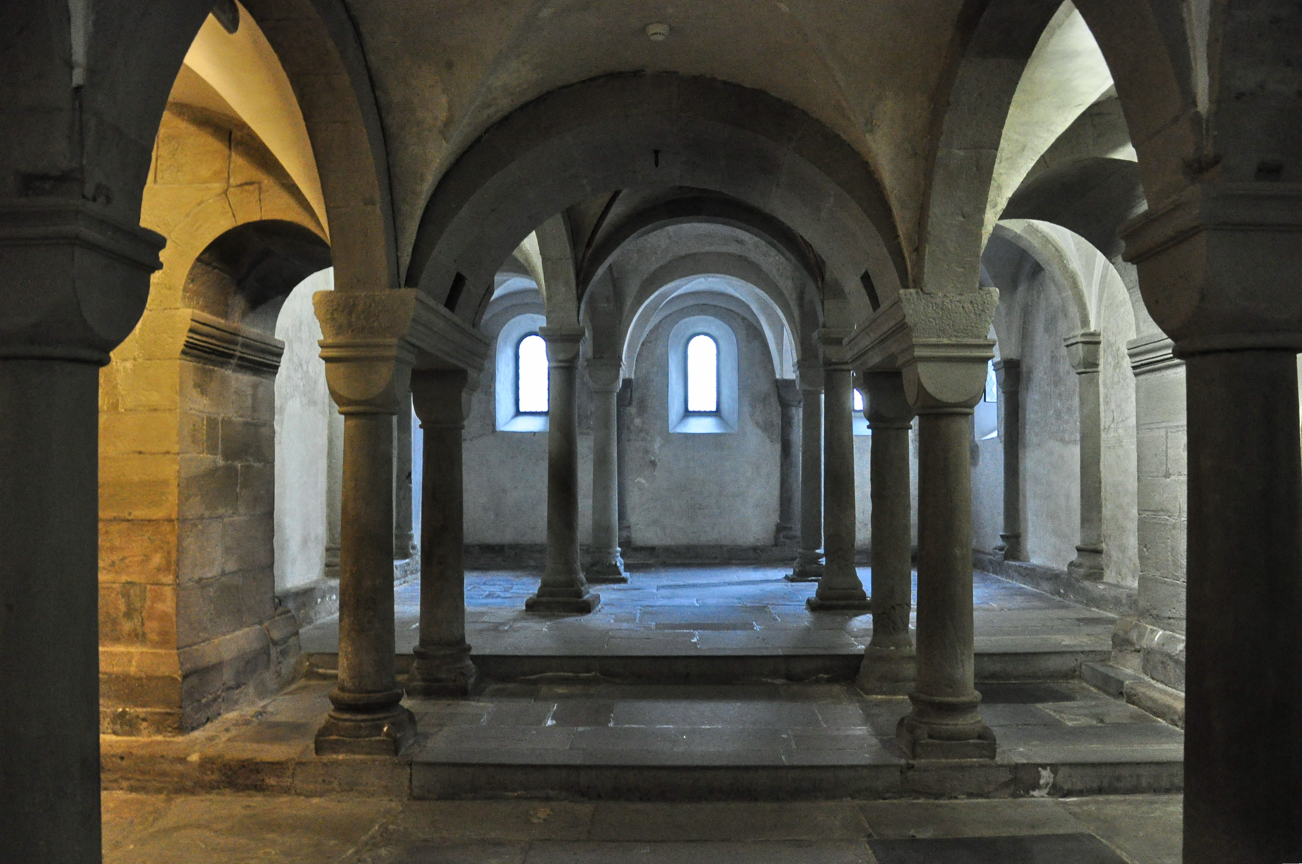 Crypt of the Grossmünster church in Zürich (Switzerland)